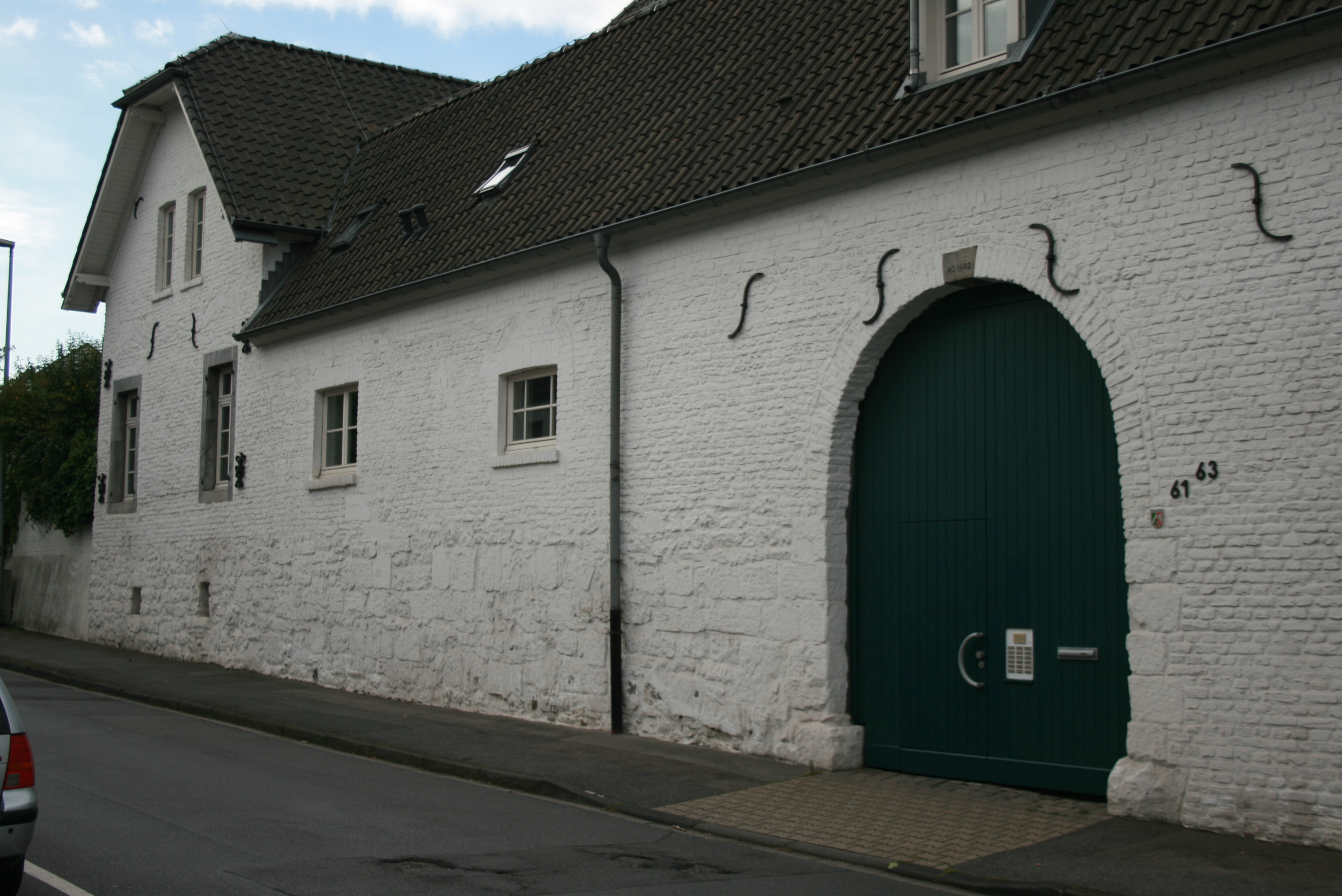 Strassenansicht von Gut Überhaaren in Aachen, Deutschland Autor: Peter Hellerhoff